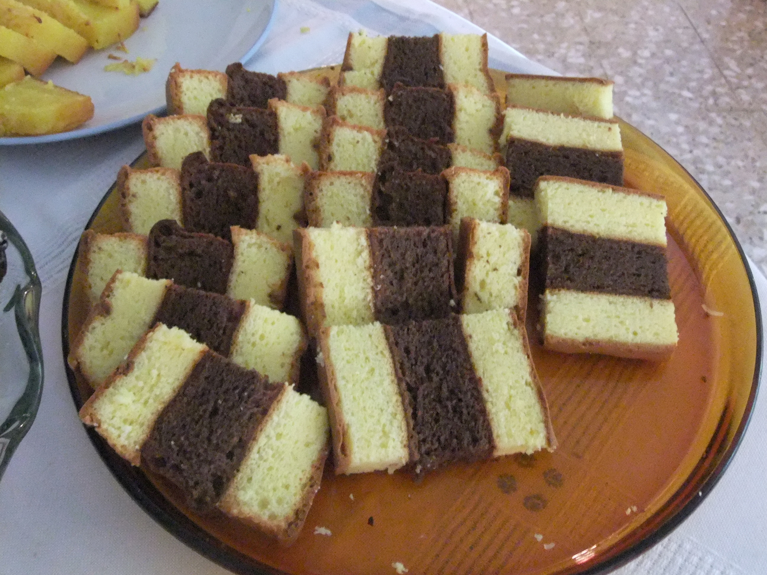 Kue lapis Surabaya